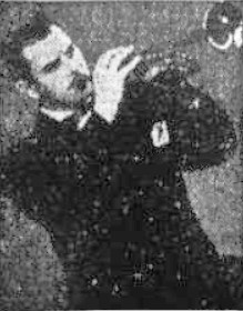 Roy Stevens